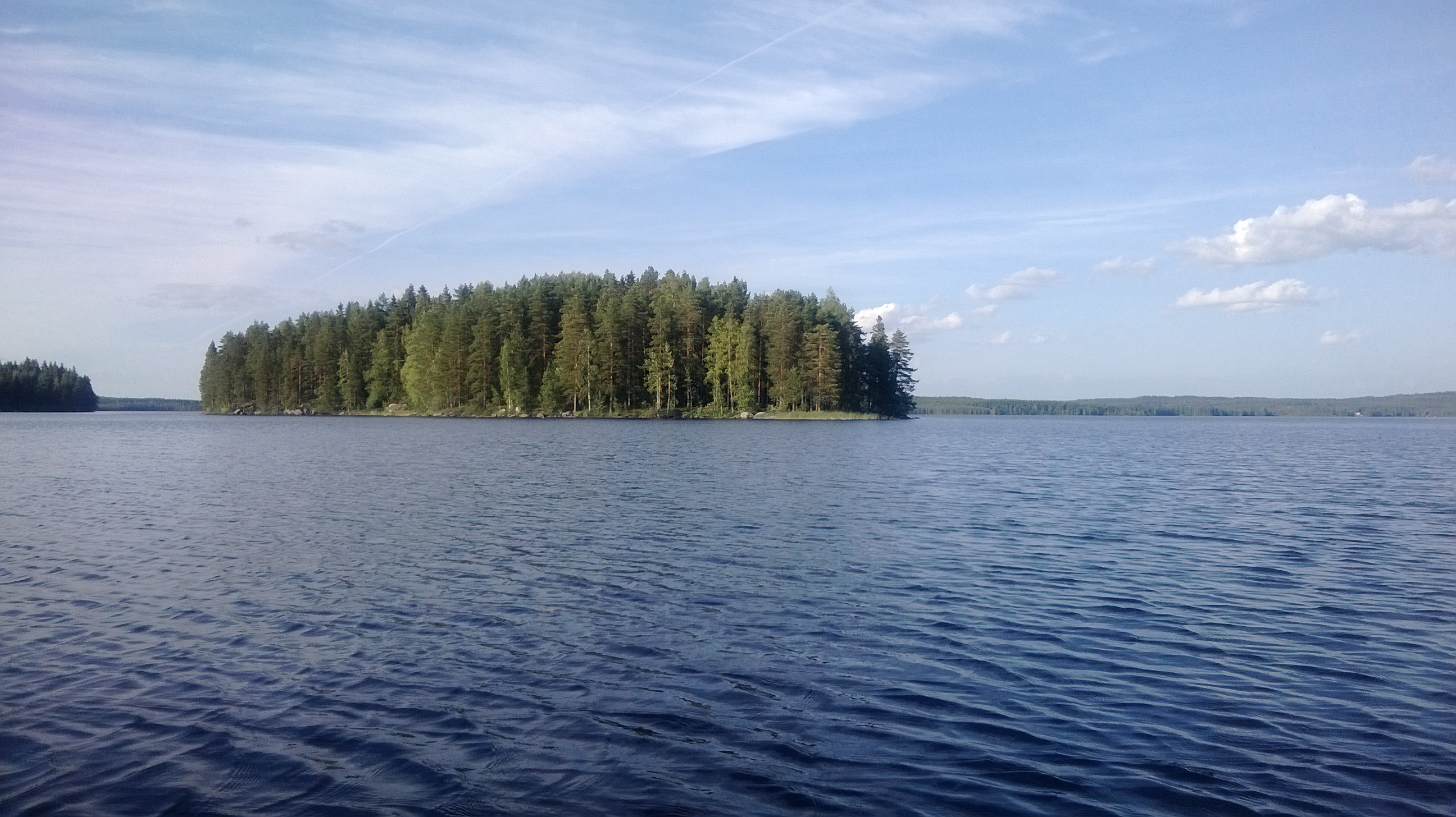 Hautasaari, Ala-Kintausjärvi, Petäjävesi, Keski-Suomi